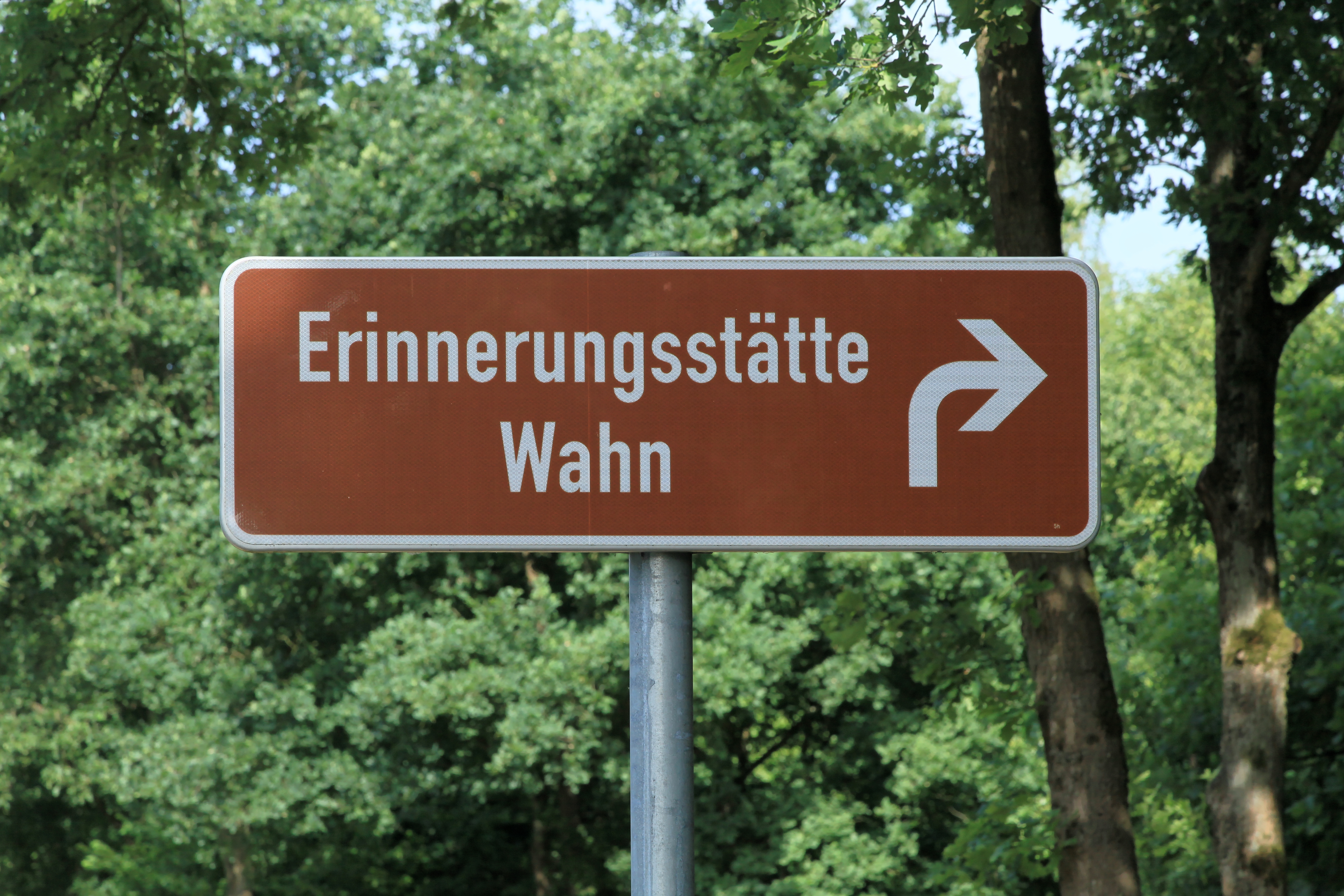 Kreisstraße 168 im Bereich der Wüstung Wahn (Hümmling) in Sögel